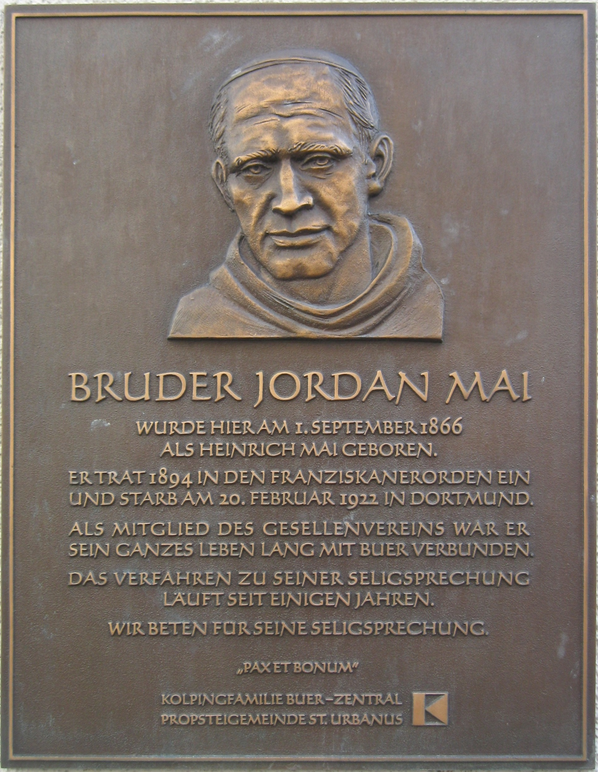 Gedenktafel am Standort des nicht mehr existierenden Geburtshauses von Bruder Jordan Mai OFM (1866–1922) in der Maximilianstraße in Gelsenkirchen-Buer (eingeweiht im Juni 2008)